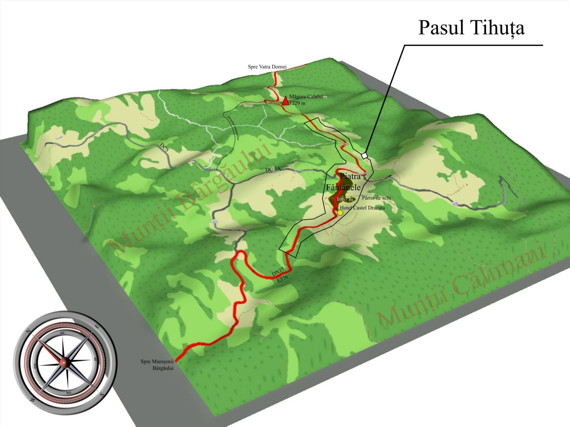 Harta 3D - Pasul Tihuța